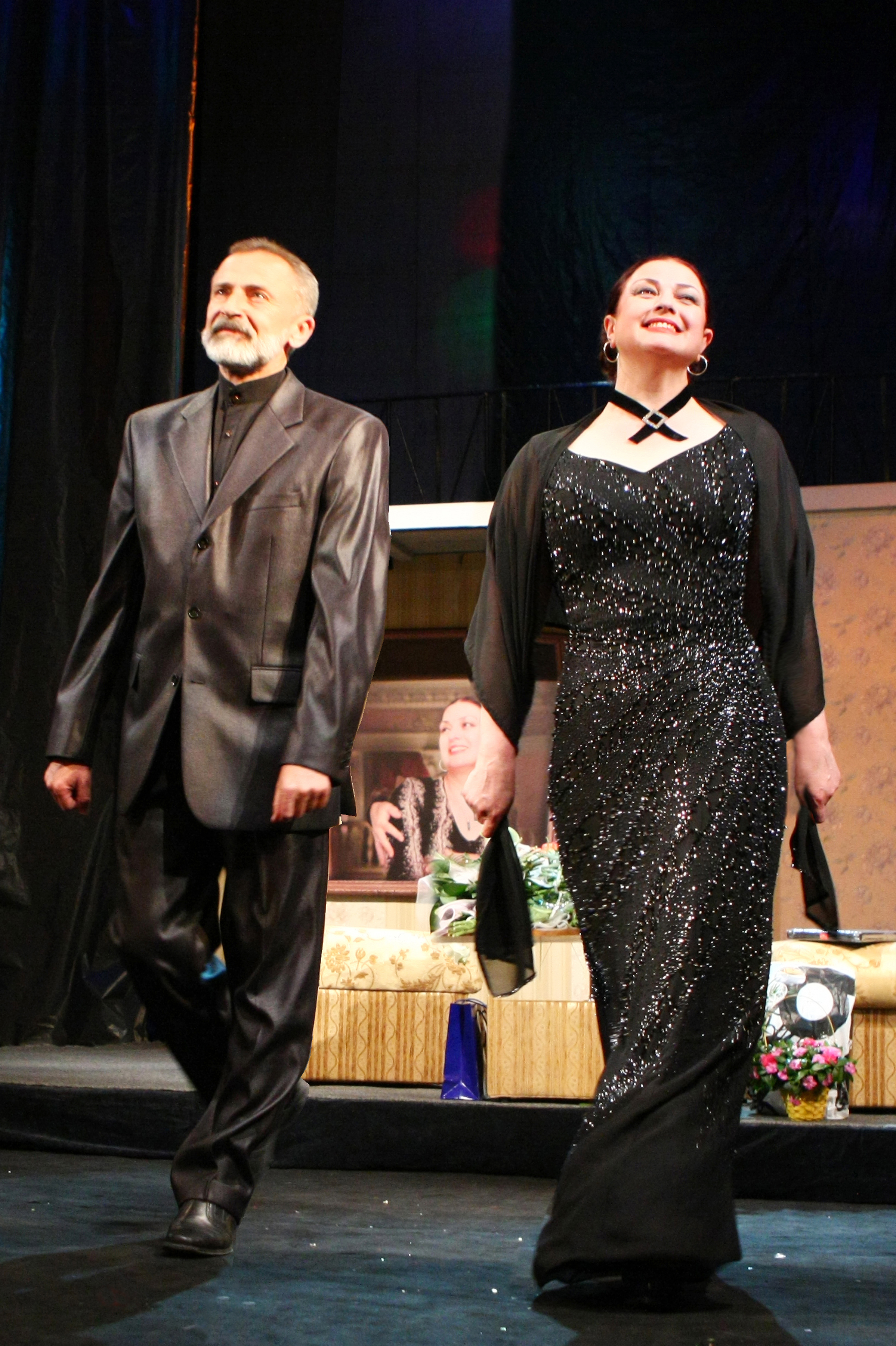 Народні артисти України Олег та Ярослава Мосійчуки.